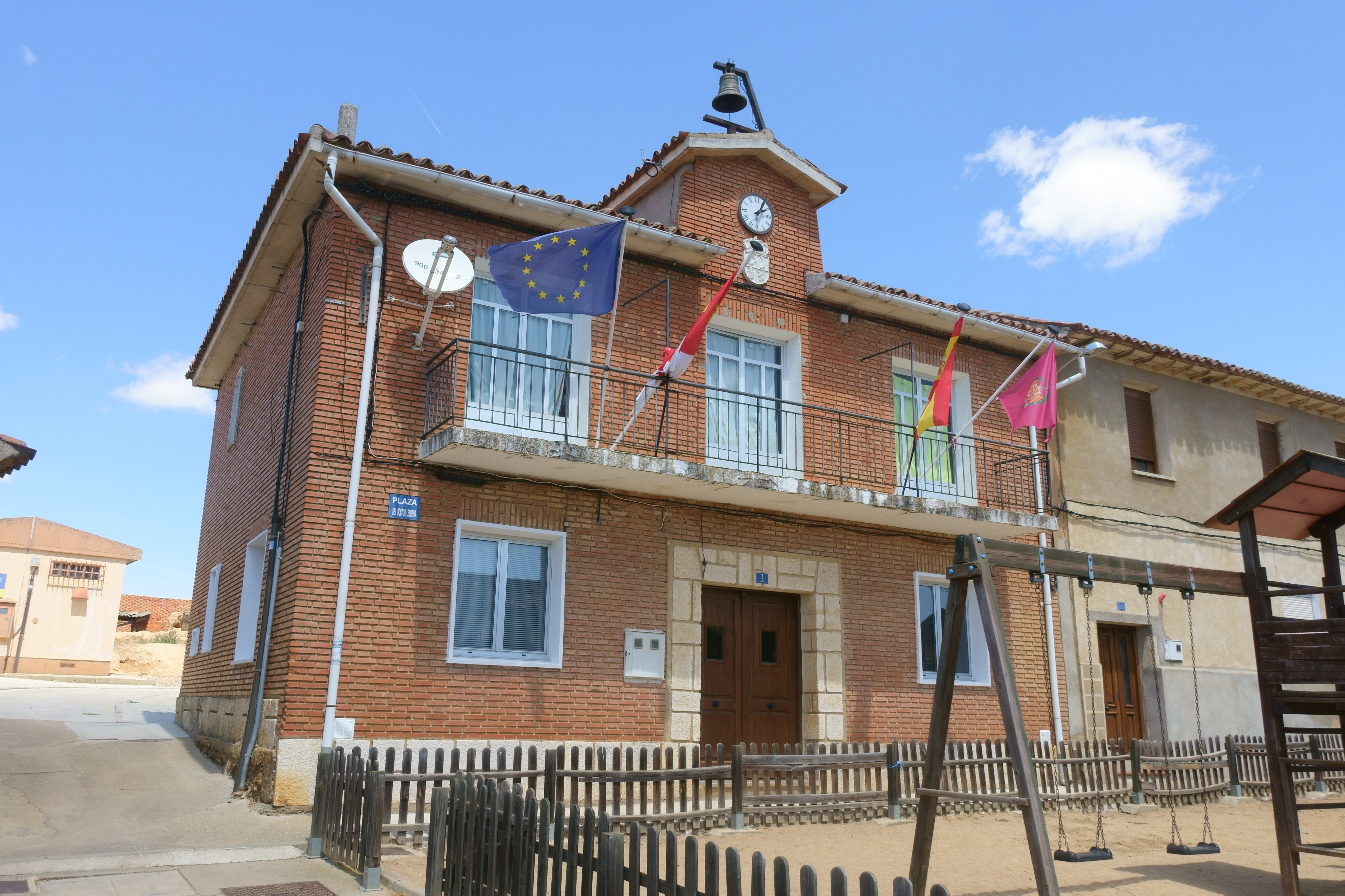 Casa consistorial de Barcial de la Loma (Valladolid, España).